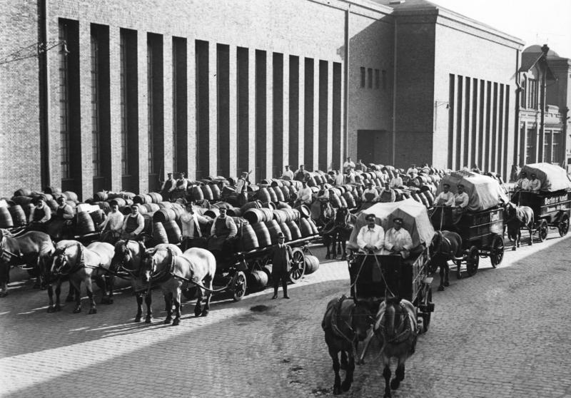 Berlin, Fuhrwerke der Kindl-Brauerei Berlin Bierkutscher der Kindl-Brauerei mit ihren Pferdefuhrwerken vor dem Stammhaus in Neukölln. (Aufnahme: 1933) 14 575-33